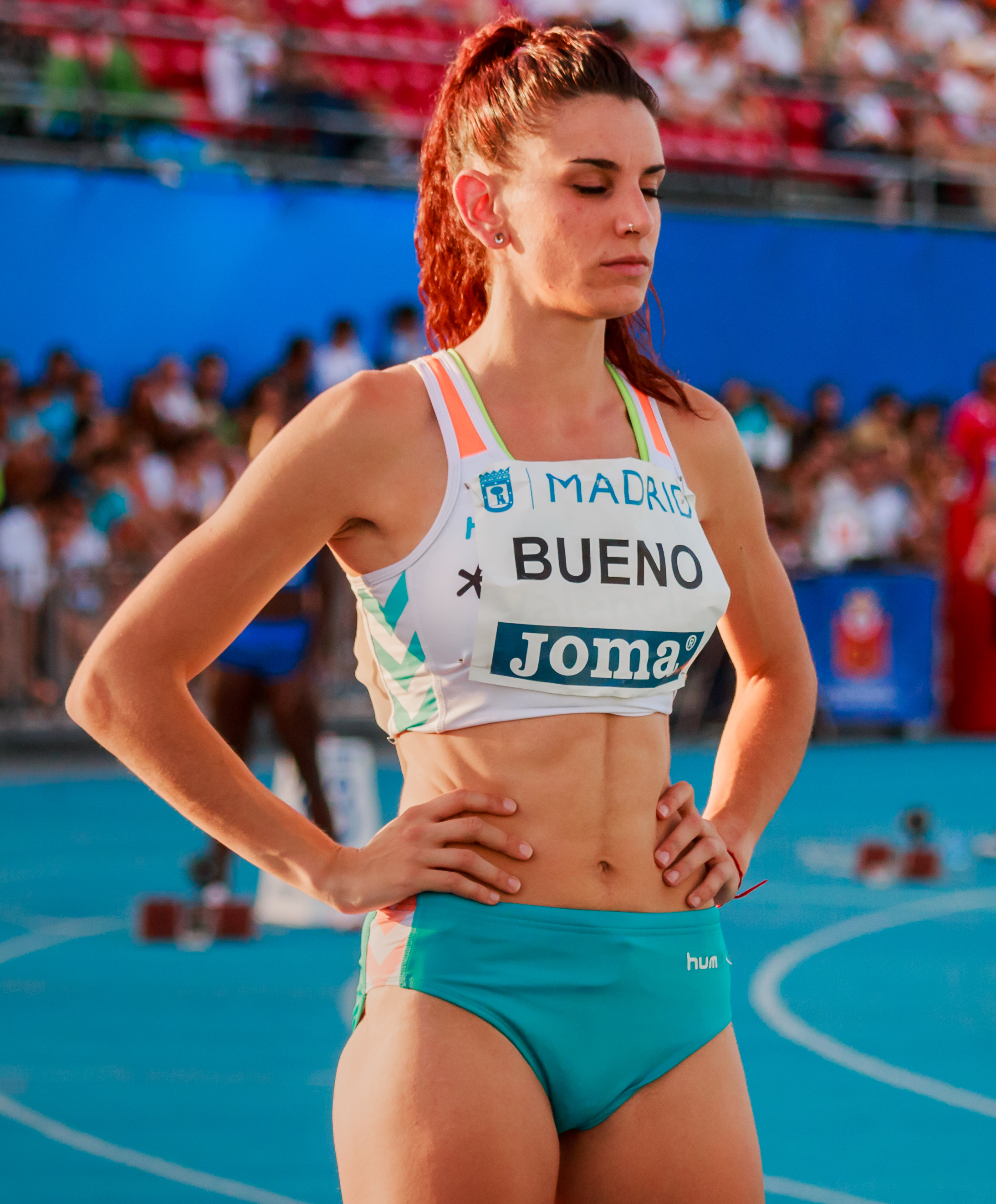 Laura Bueno (ESP). 400m. IAAF World Challenge. Meeting Madrid 2017. Moratalaz, Madrid.